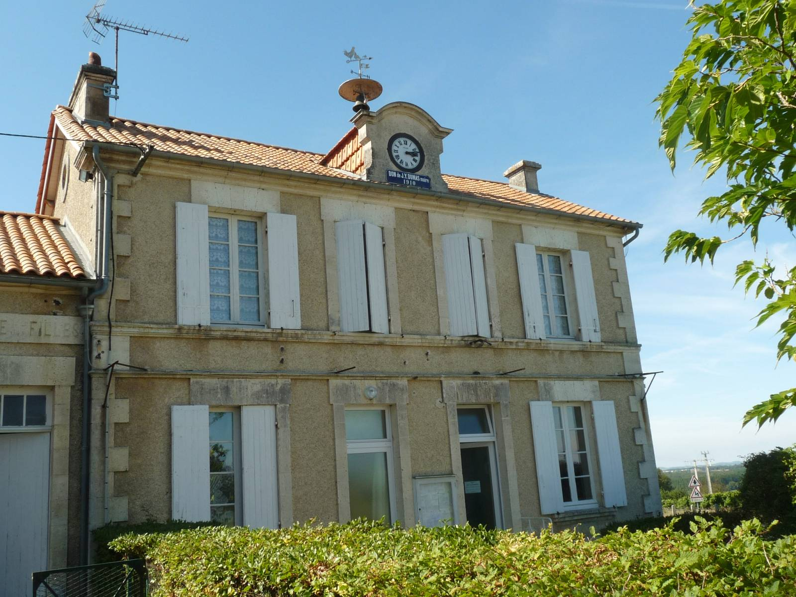 mairie de Brie-sous-Barbezieux (16), France